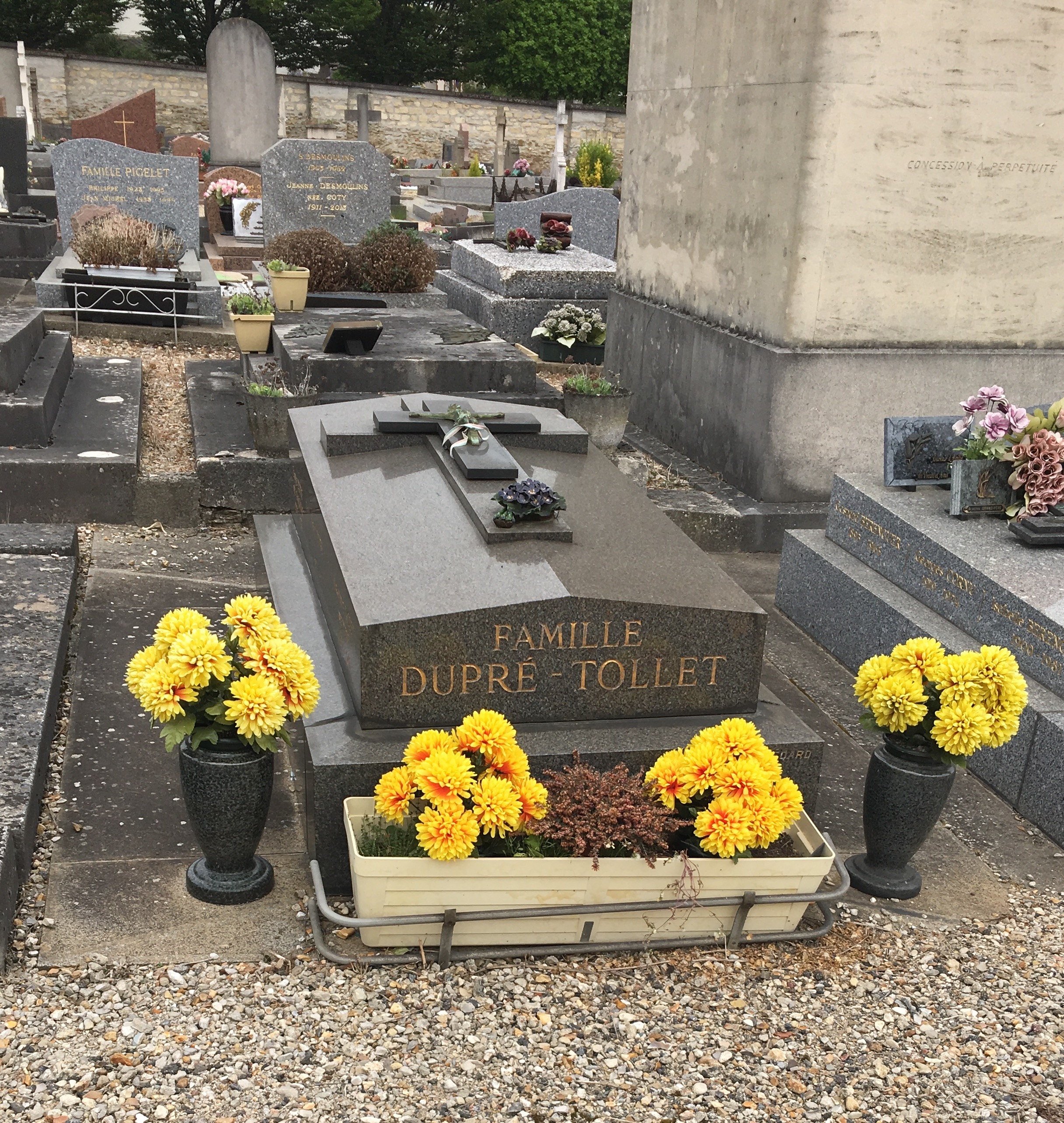 La tombe de l'organiste Marcel Dupré à Meudon